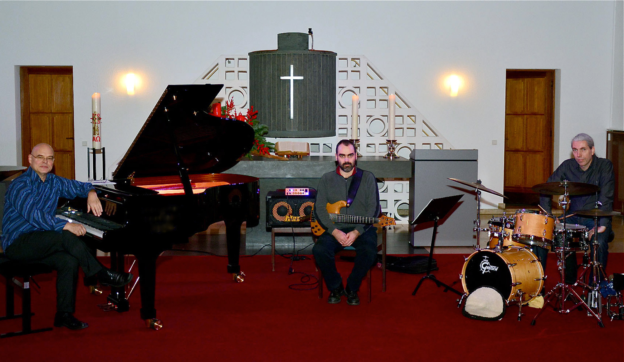 Christmas Jazz Trio